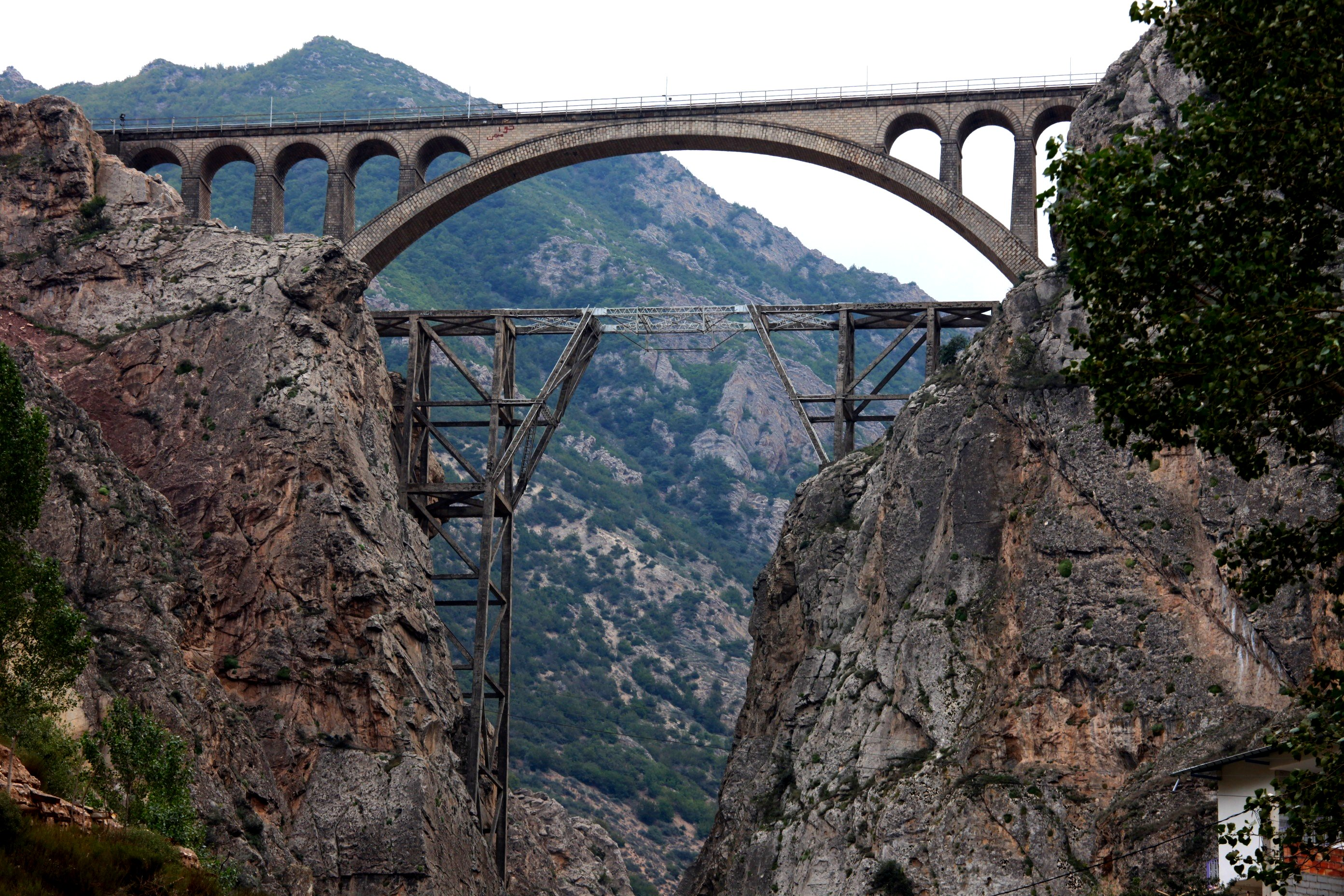 Veresk bridge, Tehran - Sari Railway